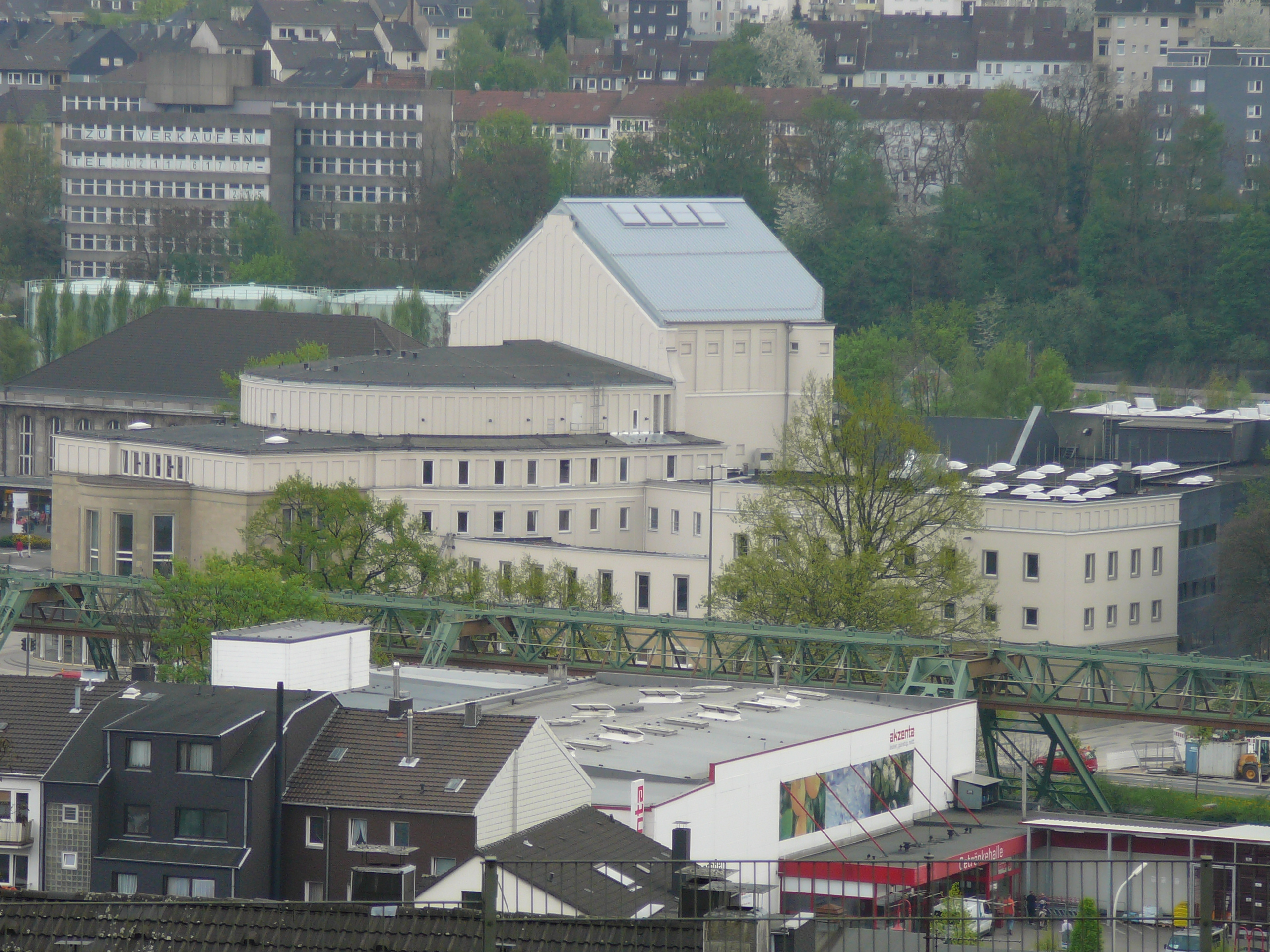 Tannenstraße, Wuppertal